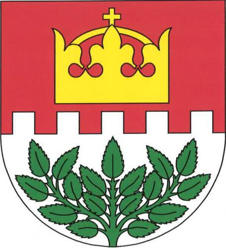 Zachrašťany znak